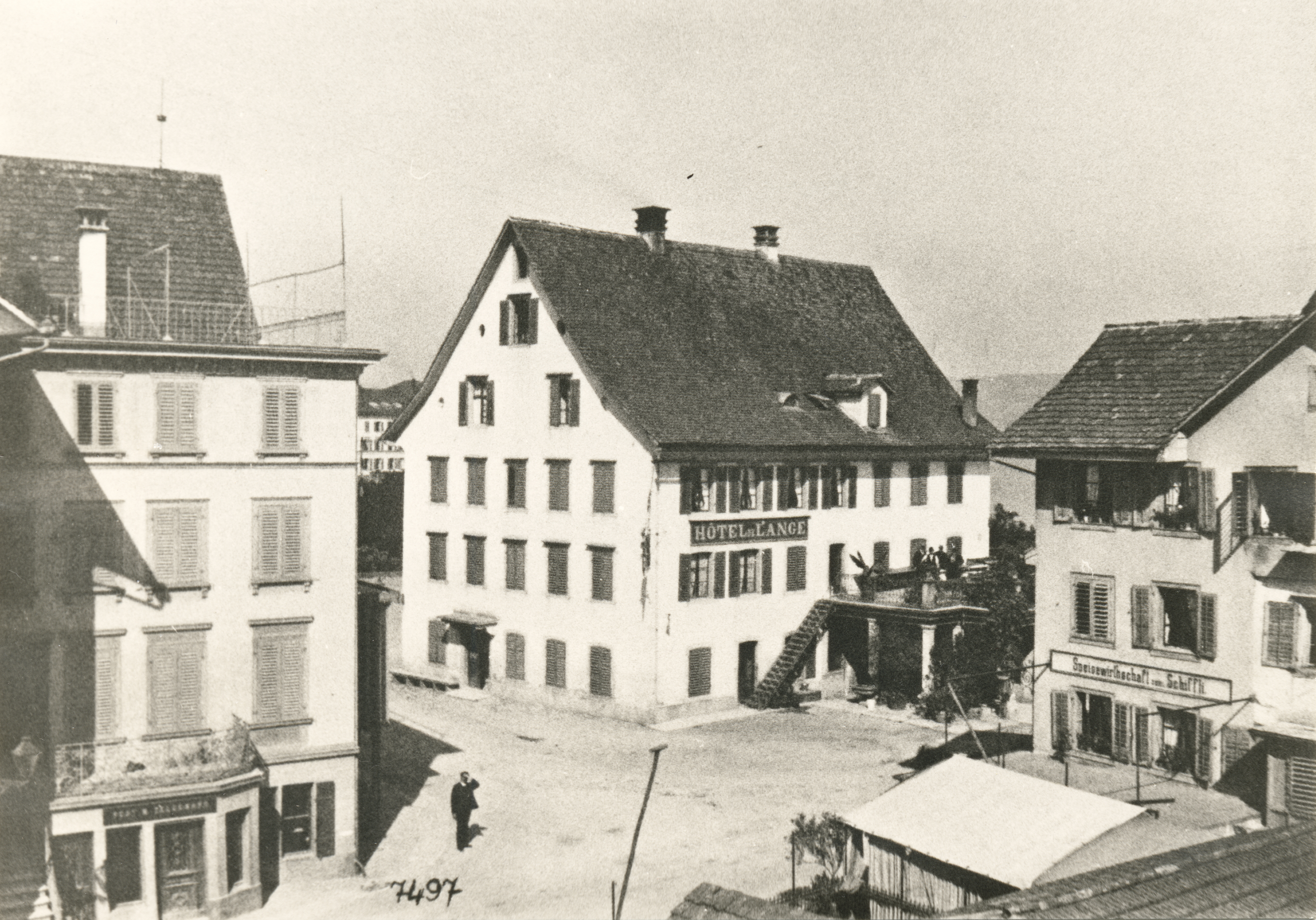 "Engel"/"Hôtel de l’Ange", Postrasse 2, Richterswil. Stand zur Zeit seiner Erbauung (um 1780) unmittelbar an der Schifflände. Hier logierte die internationale Klientel des Arztes Johannes Hotze (1734–1801). Zusammen mit 22 anderen Gebäuden wurde das Baudenkmal 1982 der neuen Seestrasse geopfert. Archiv Kantonale Denkmalpflege Zürich.